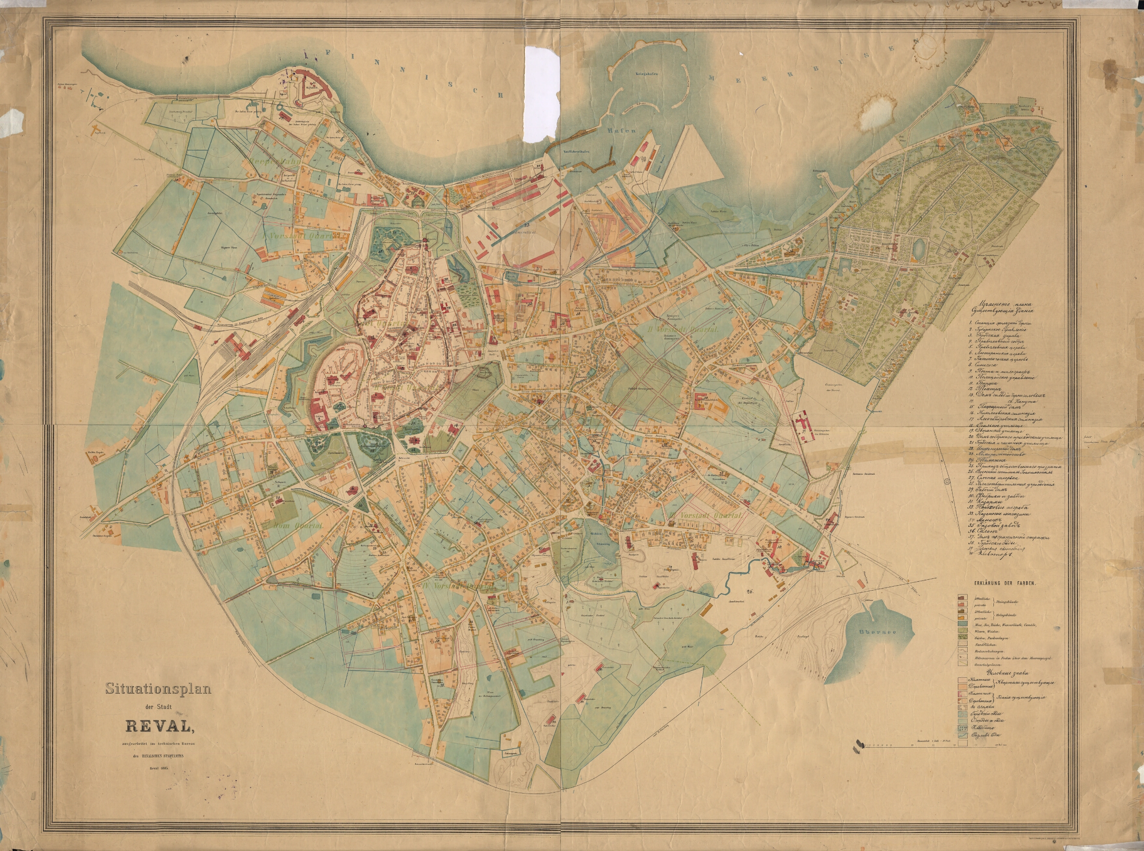 Leht 1 plaan Situationsplan der Stadt Reva